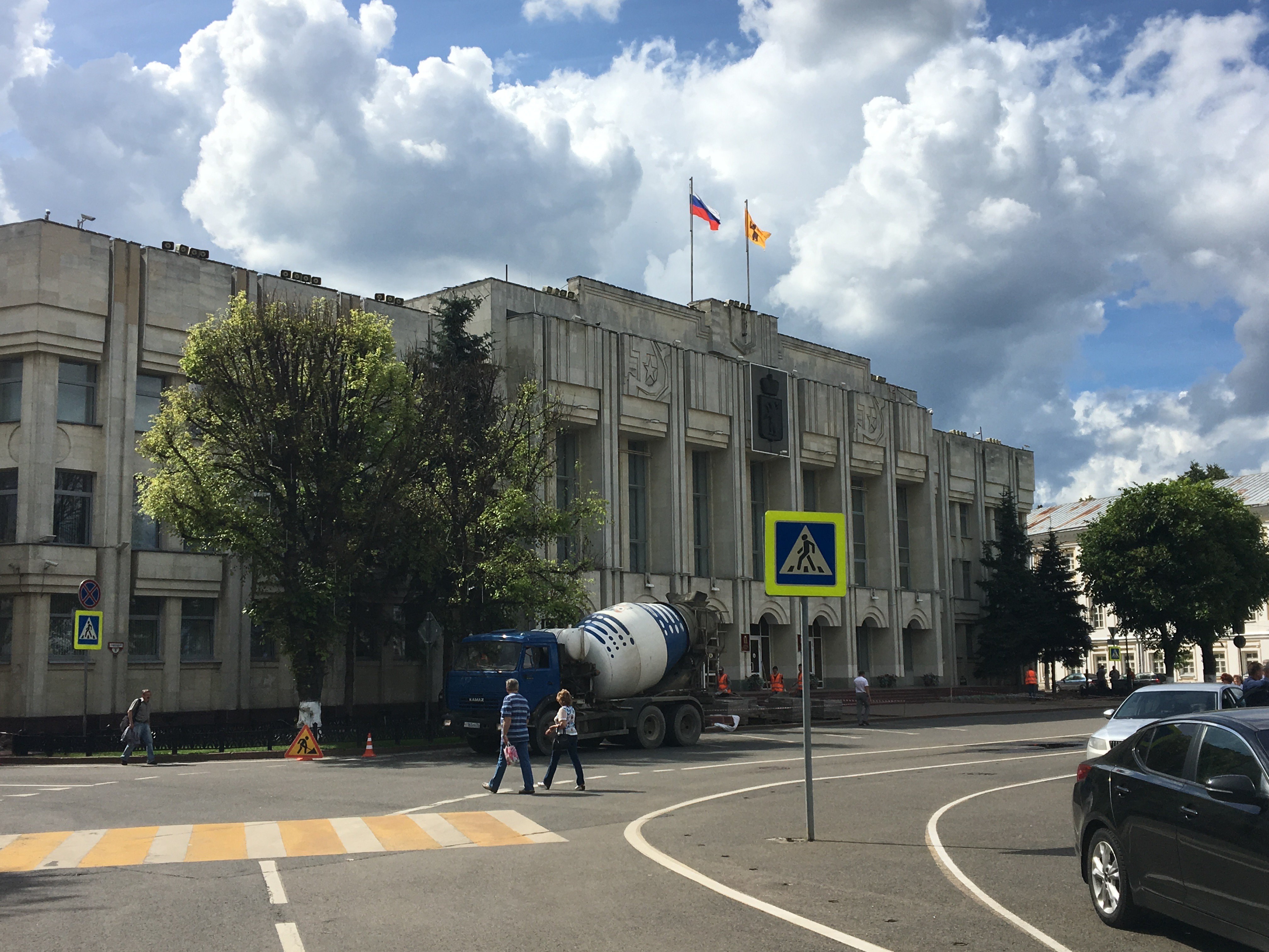 Здание Правительства Ярославской области, фотография сделана в июле 2017 года.